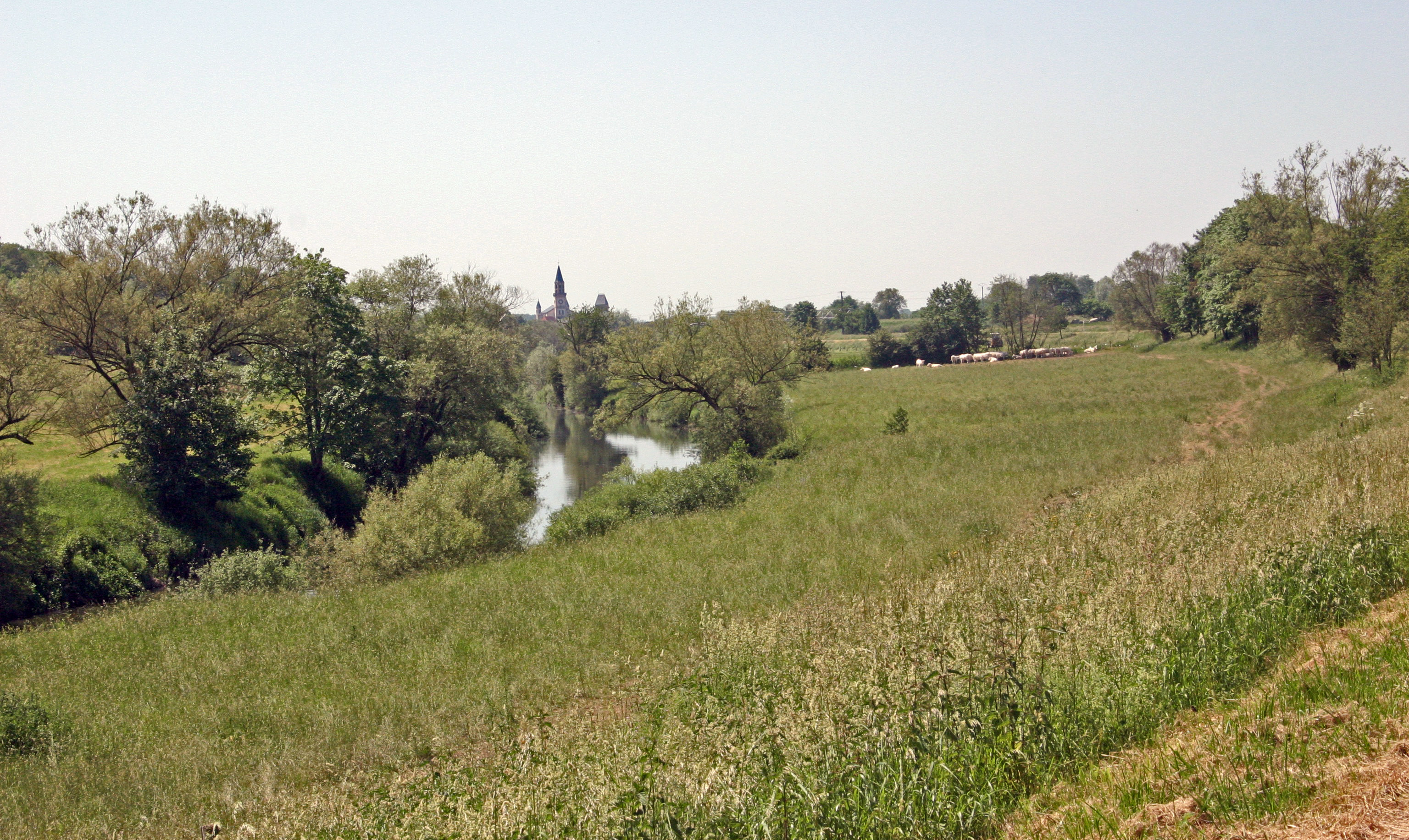 Herbitzheim